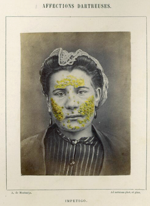 Kolorierte Fotographie